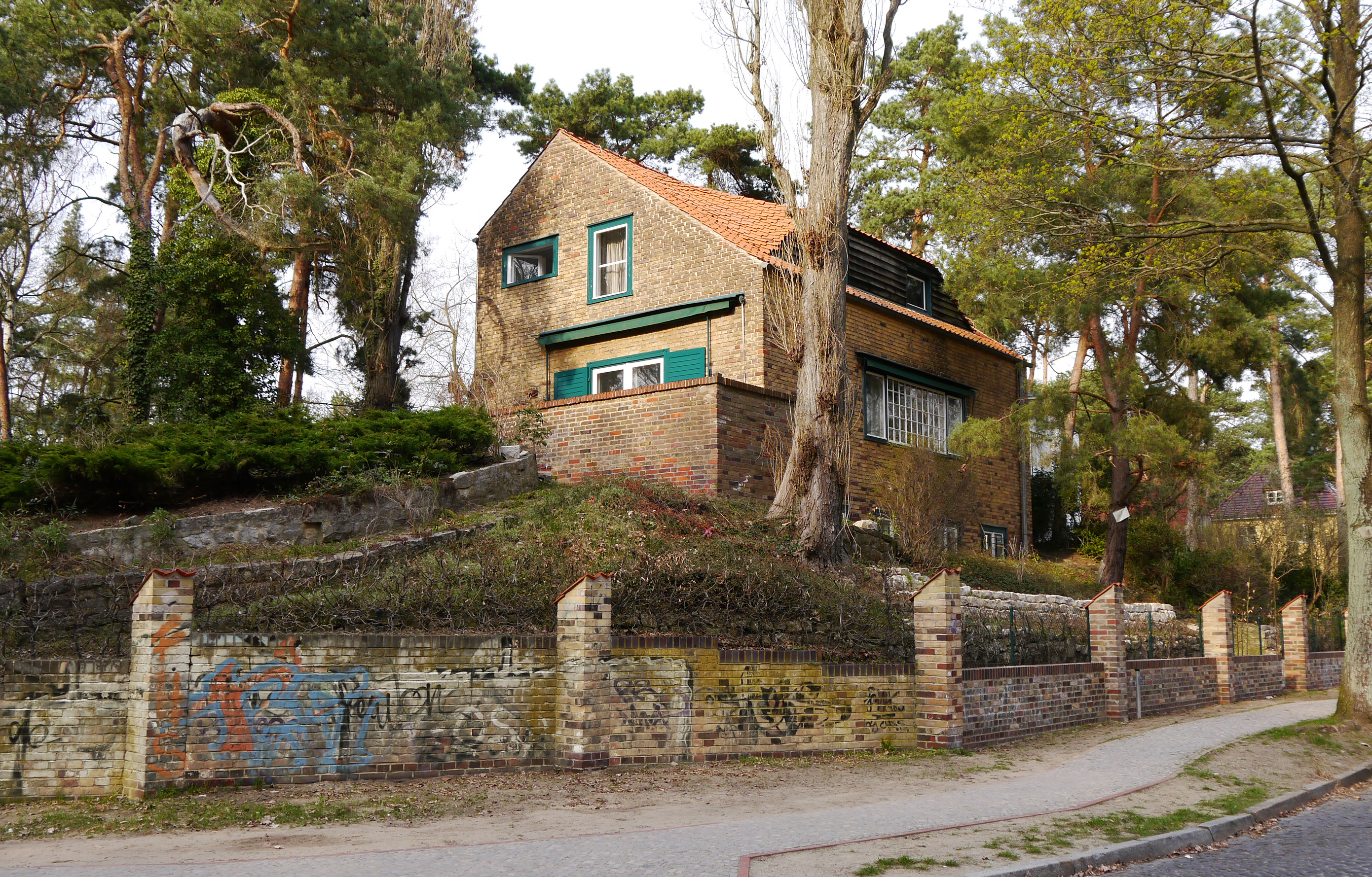 Baudenkmal: Am Weinberg 5, Kleinmachnow, Wohnhaus Paul Henckels